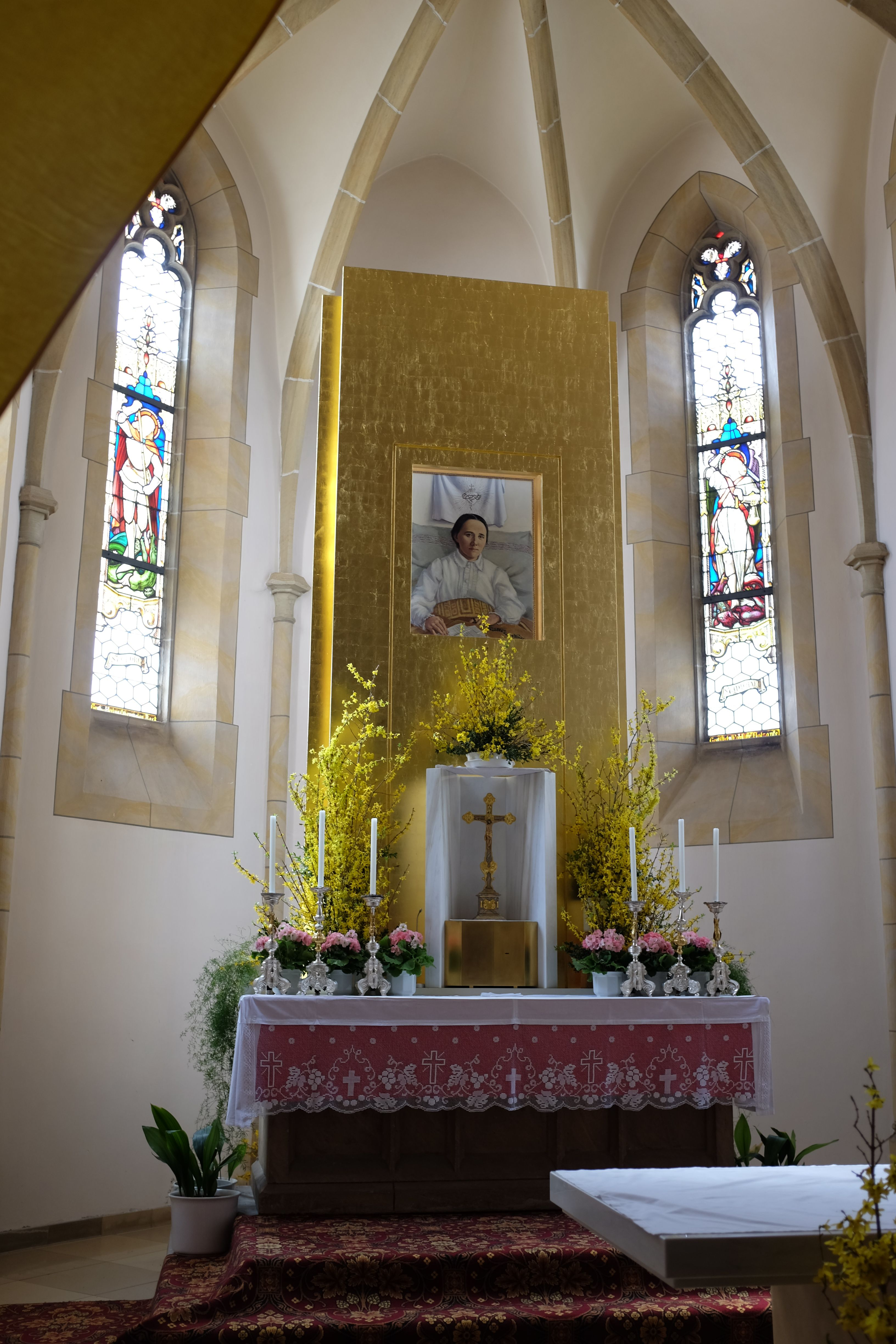 Altar der Pfarrkirche St. Nikolaus in Mindelstetten mit einem Porträt von Anna Schäffer.